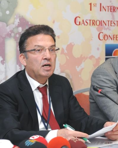 SUAYIB YALCIN GASTROINTESTINE